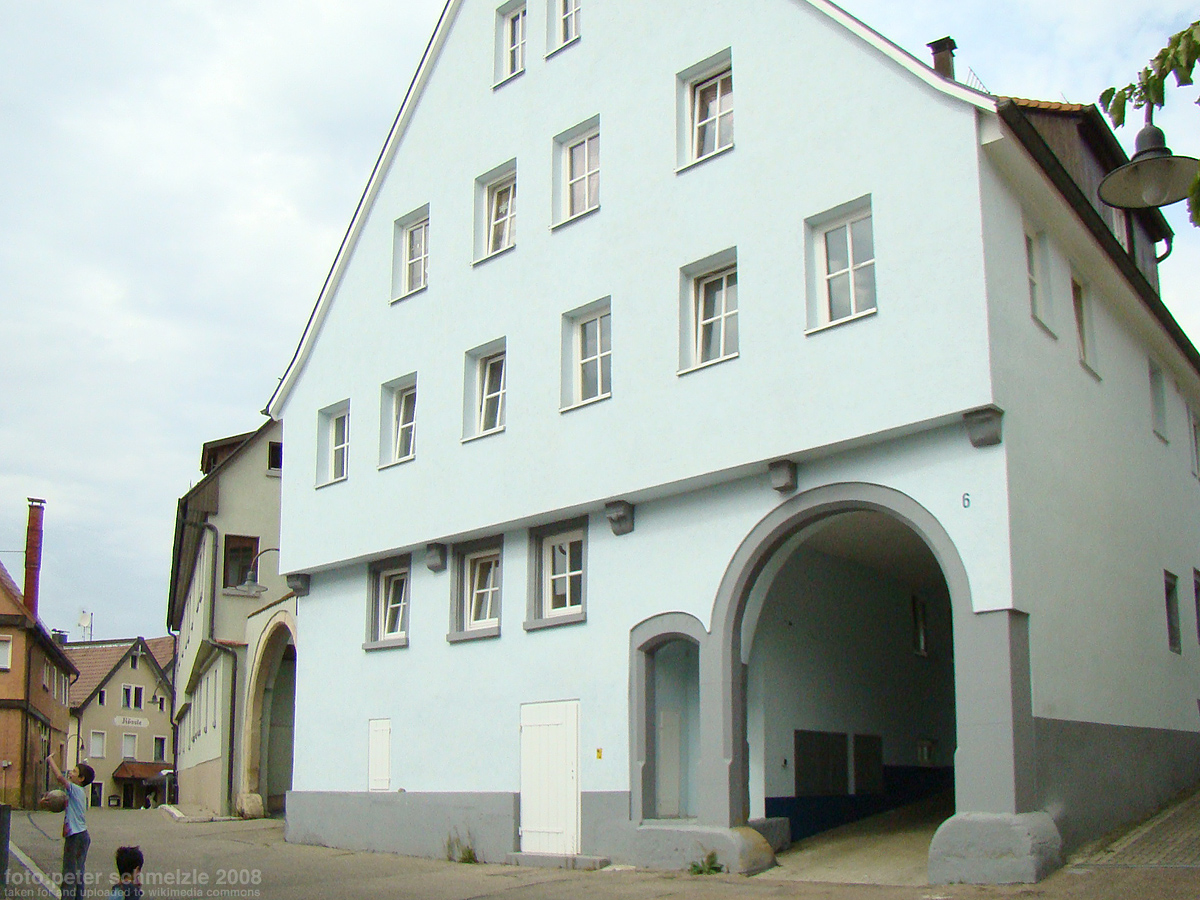 Gebäude Görresstr. 6 in Heilbronn-Sontheim